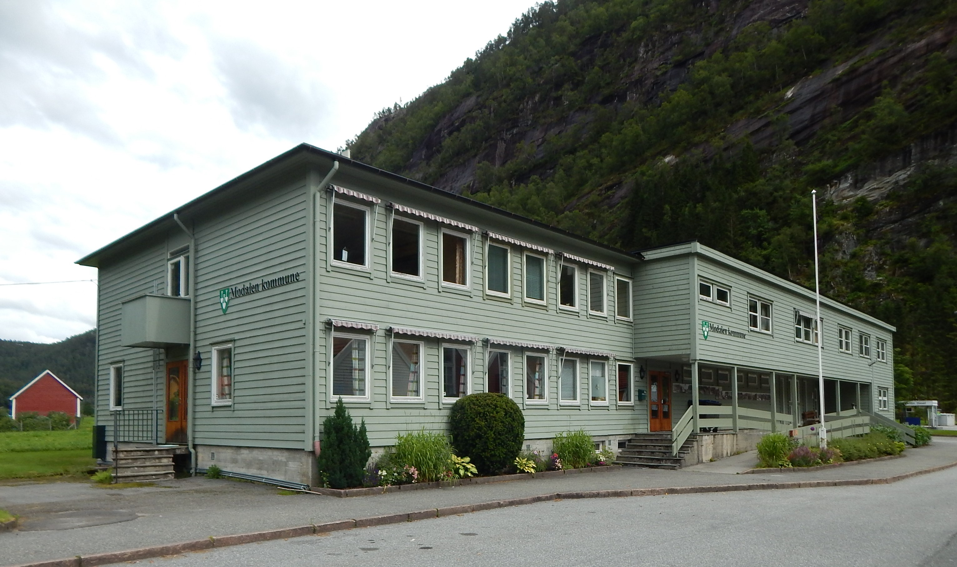 Modalen rådhus/kommunehus, Mo